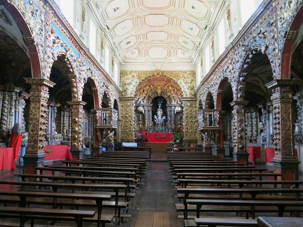 Igreja Matriz de Nossa Senhora da Conceição (Sabará)